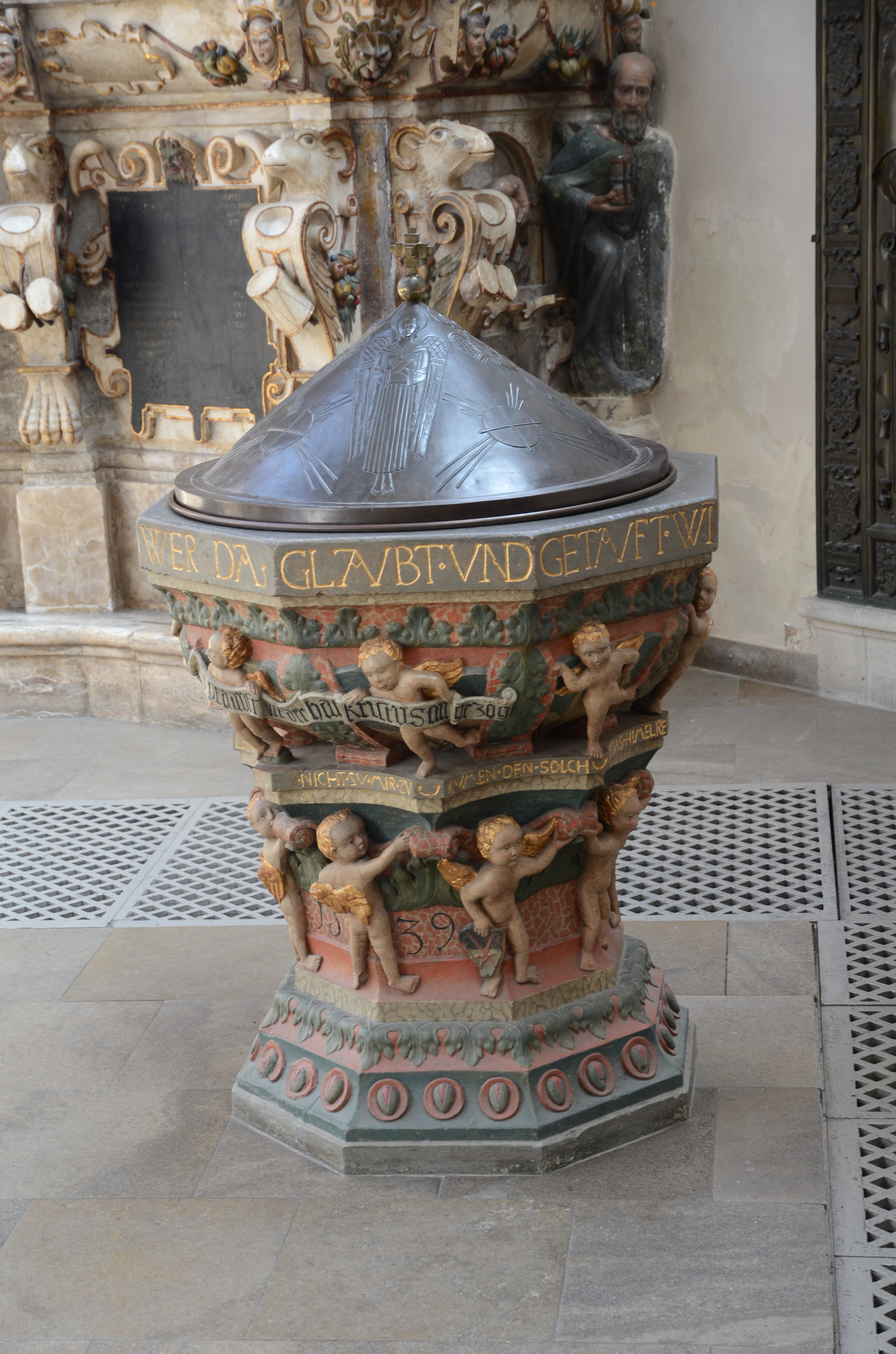 evang.-luth. Moritzkirche in Coburg, Taufstein